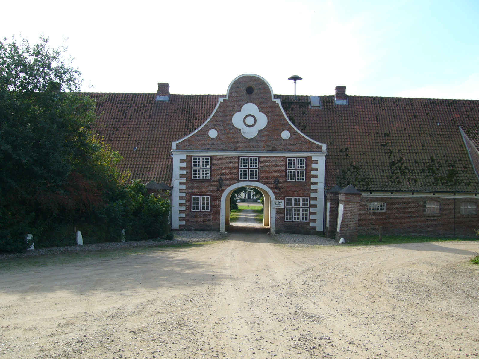 Gut Rastorf - Torhaus aus dem Jahr 1729